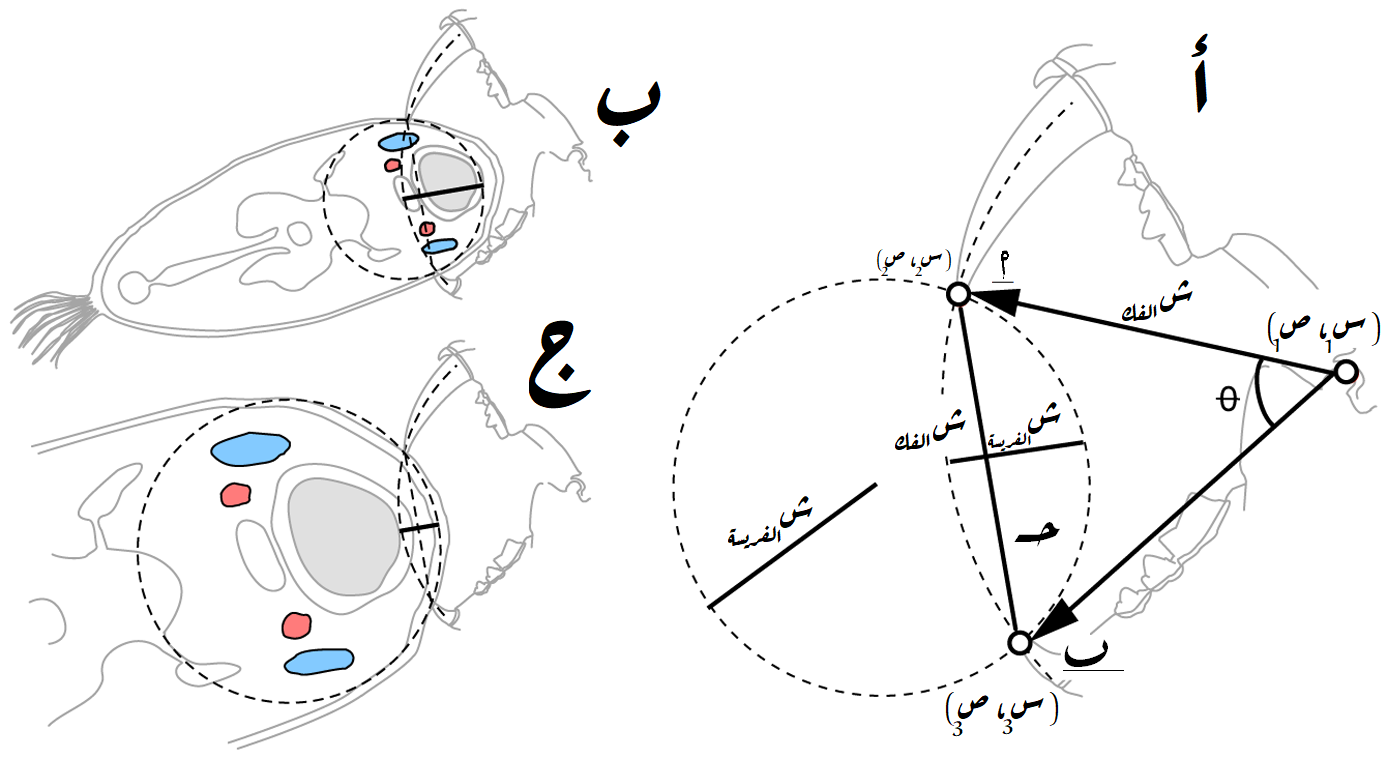 المقدار الأقصى لِفتحة فم السنَّور سيفيّ الأسنان، وأُسلوب عضها لأعناق طرائدها. مُخطط الطريدة مُمثل على شكل دائرة. في الرسم الصافي لِلفك، يظهر أنَّ مقدار الفتح الأقصى يُساوي مقدار ما يتسع بين النابين الطويلين عندما يفتح الحيوان فمه على أقصى درجةٍ مُمكنة. (أ) هندسة الدائرة الأساسيَّة تُحدد عُمق العضَّة (هـ = ش الفريسة + ش الفك) في شُعاع الفريسة (ش الفريسة) مع إظهار الفُسحة المُتاحة لِلنابان (حـ) وحجم الفك (ش الفك). الرسم (ب) يُظهر هندسة عض طرائد ذات أحجام مُختلفة - وكيف يُمكنُ لِهذا السنُّور أن يتسبب بِجُرحٍ قاتلٍ من هكذا عضَّة. الرسم (ج) يُظهرُ طريدةً أضخم بِمرتين من الطريدة الأولى، وعندها يُمكن لِلسنَّور أن يجرحها جُرحًا سطحيًّا فقط عند عضِّها. تظهر أيضًا الأوردة (بالأزرق) والشرايين (بالأحمر) والرغامي (بالرمادي).